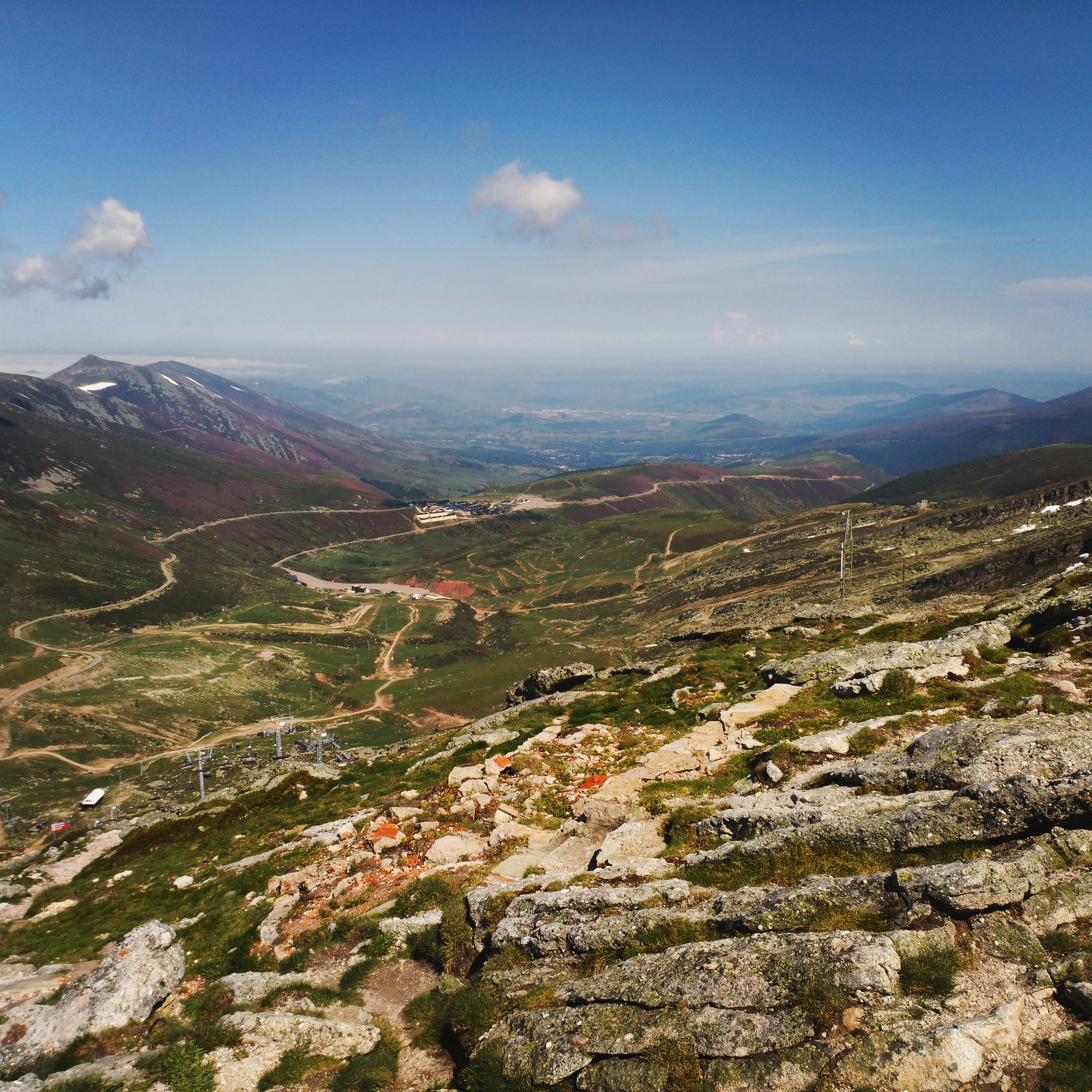 Vista del valle del río Híjar-Ebro desde la cima del pico Tresmares, en la foto podemos ver parte de los remontes de la estación de esquí y montaña de Alto Campoo. Además, con menos nitidez también se llega a apreciar la ciudad cántabra de Reinosa. Foto tomada el domingo 7 de Junio de 2015 por Pablo Ardura